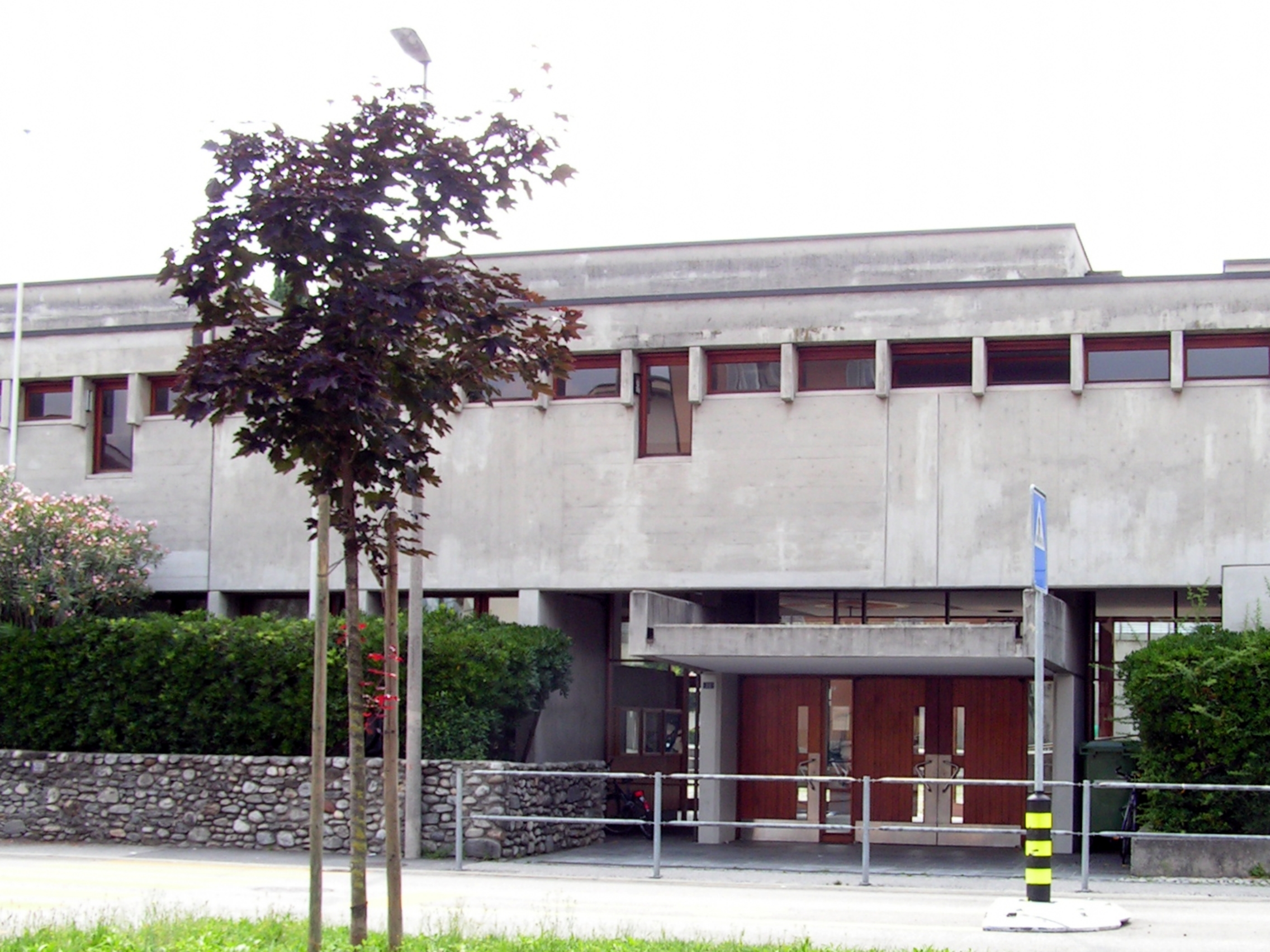 Via A. Varesi 30, Locarno. Gymnase cantonal (1963). Dolf Schnebli, architecte. Façade rue.